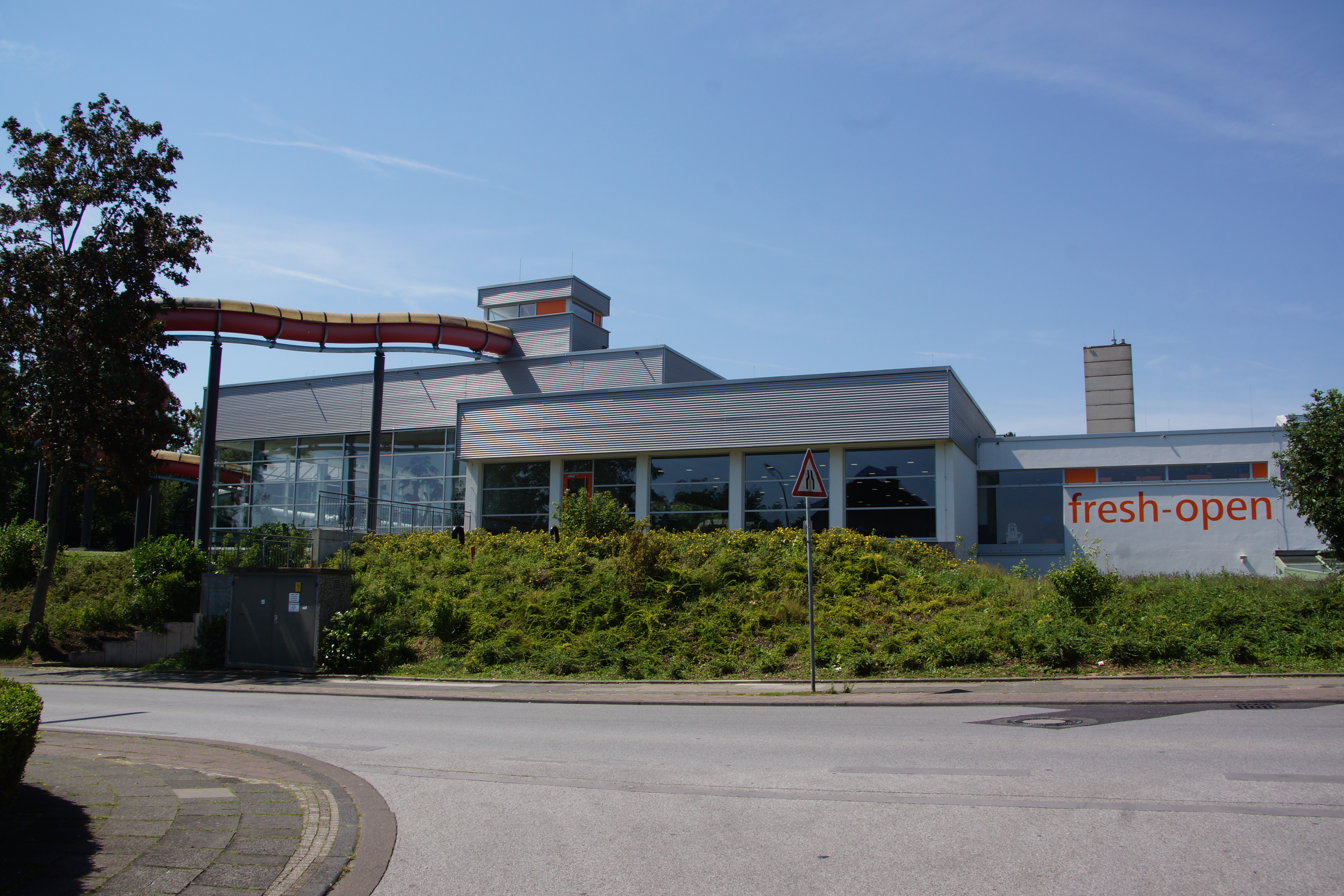 Hallenbad "fresh open" in Frechen